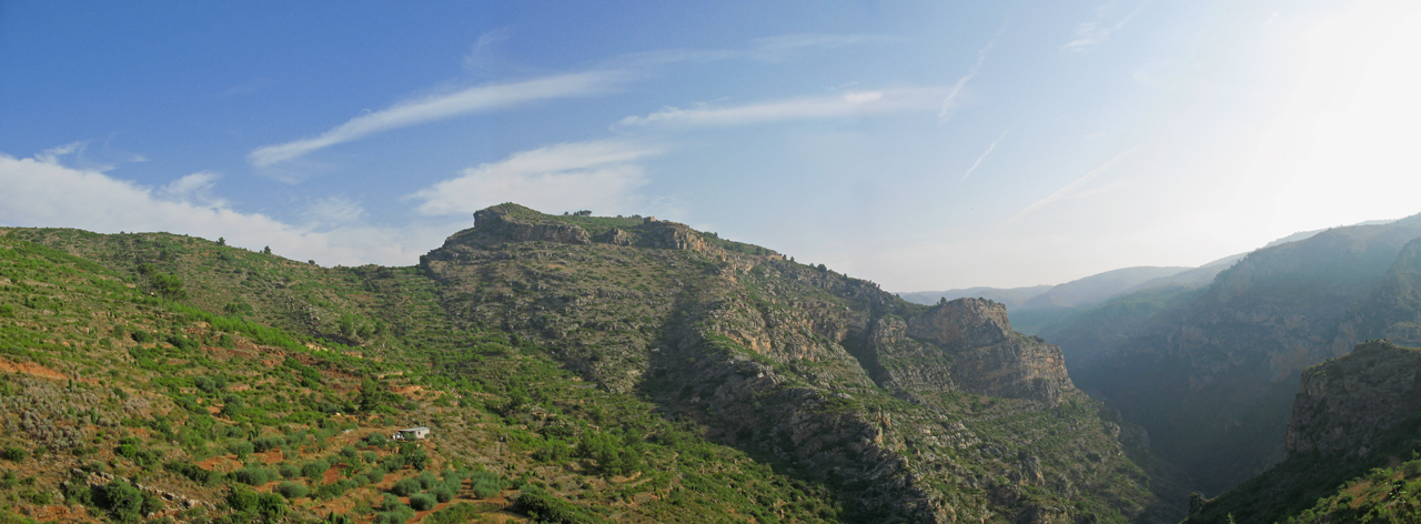 Muela de Agelita